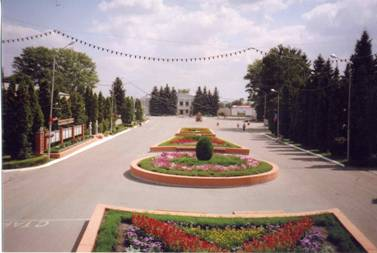 Центральная улица Станового